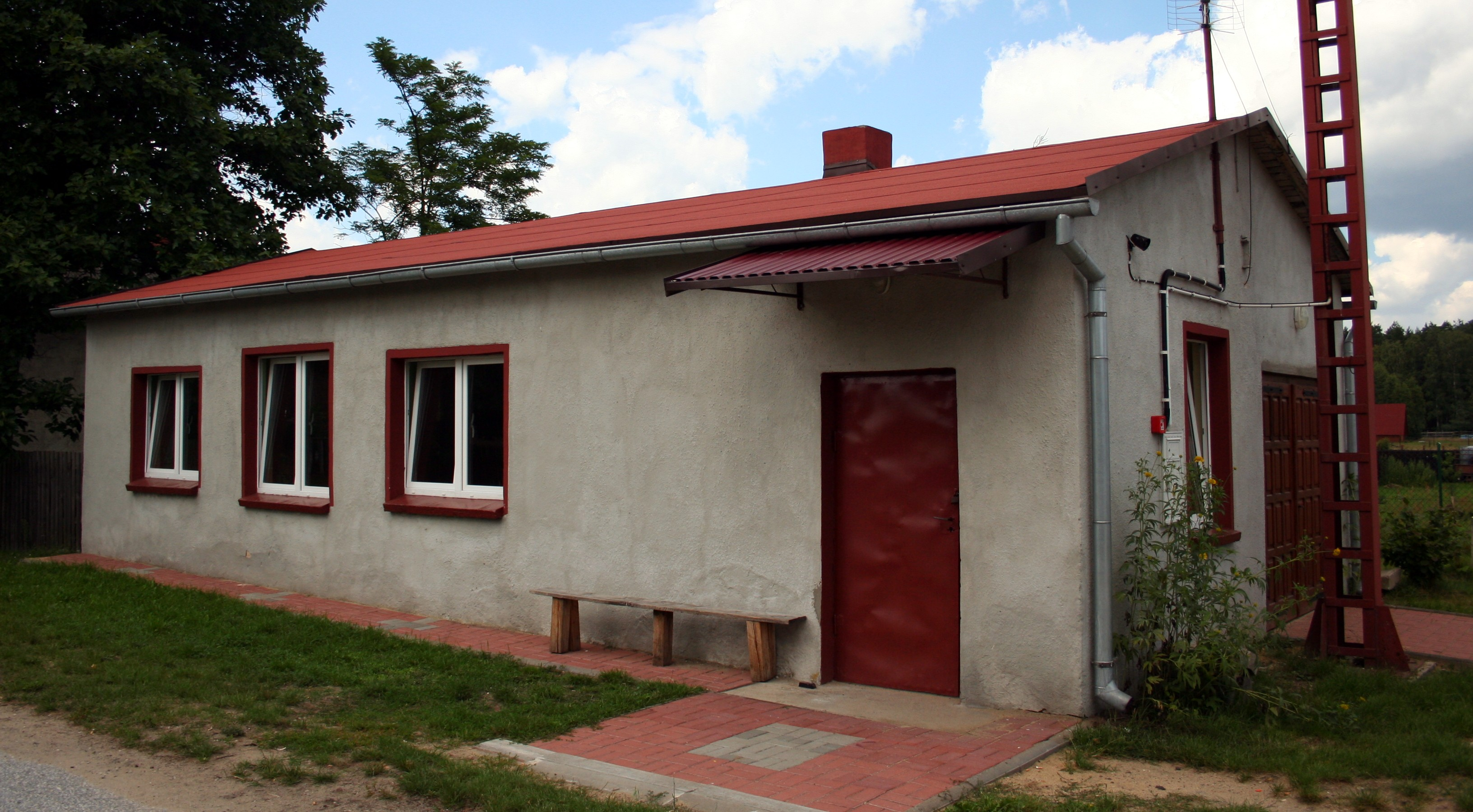 świetlica w Kierzkach, gmina Herby, powiat lubliniecki